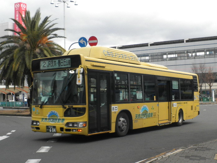 鳥飼営業所所属のCNGバス